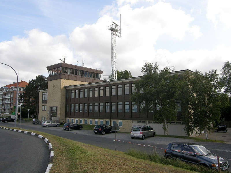 Bilder aus Cuxhaven